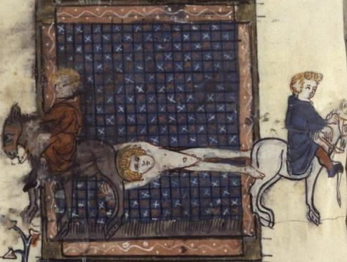 Martyre de saint Hippolyte (Martyrdom of Saint Hippolytus). Cote : Français 185 , Fol. 99v . Vies de saints, France, Paris, XIVe siècle, Richard de Montbaston et collaborateurs.